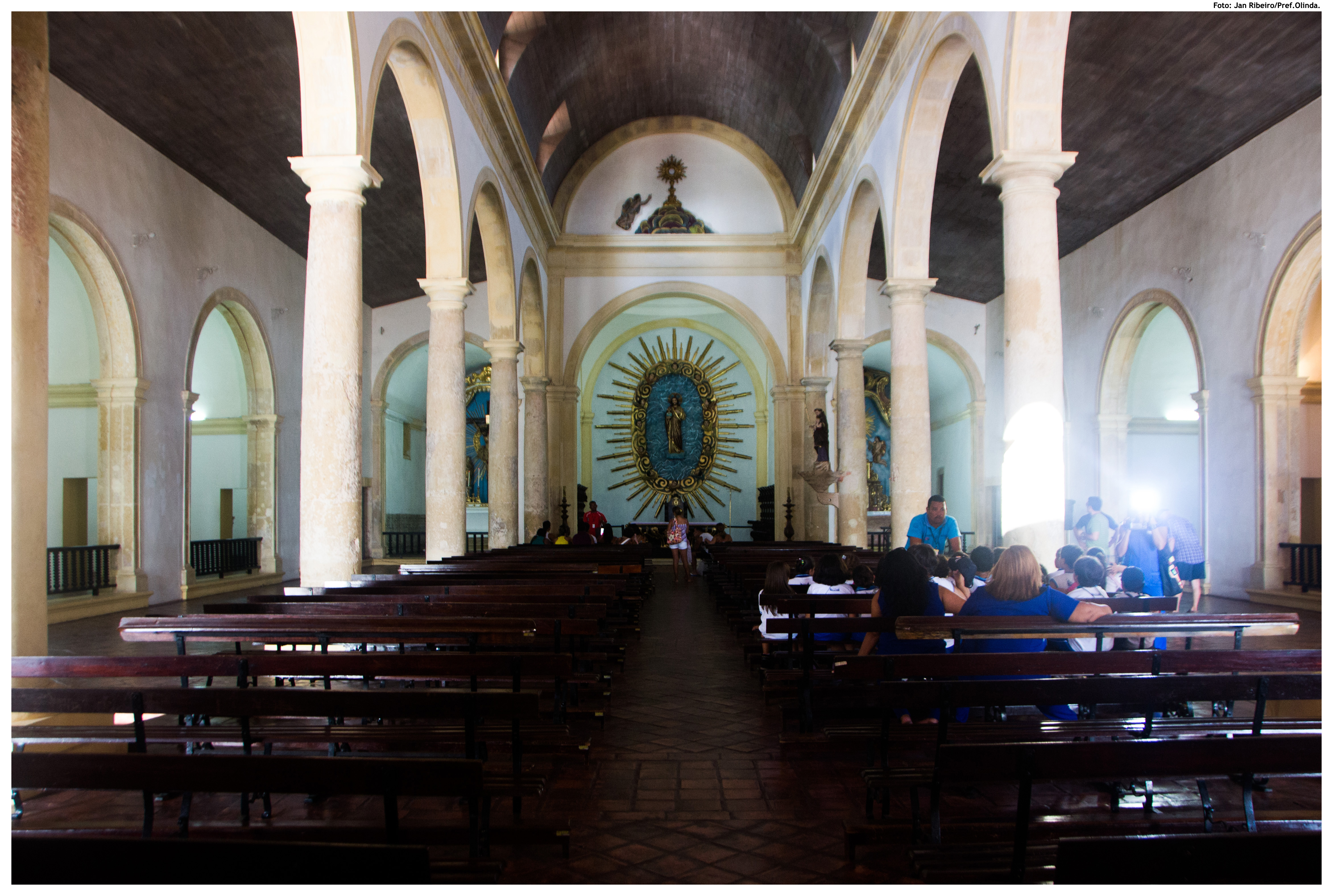 Foto: Jan Ribeiro/Pref.Olinda